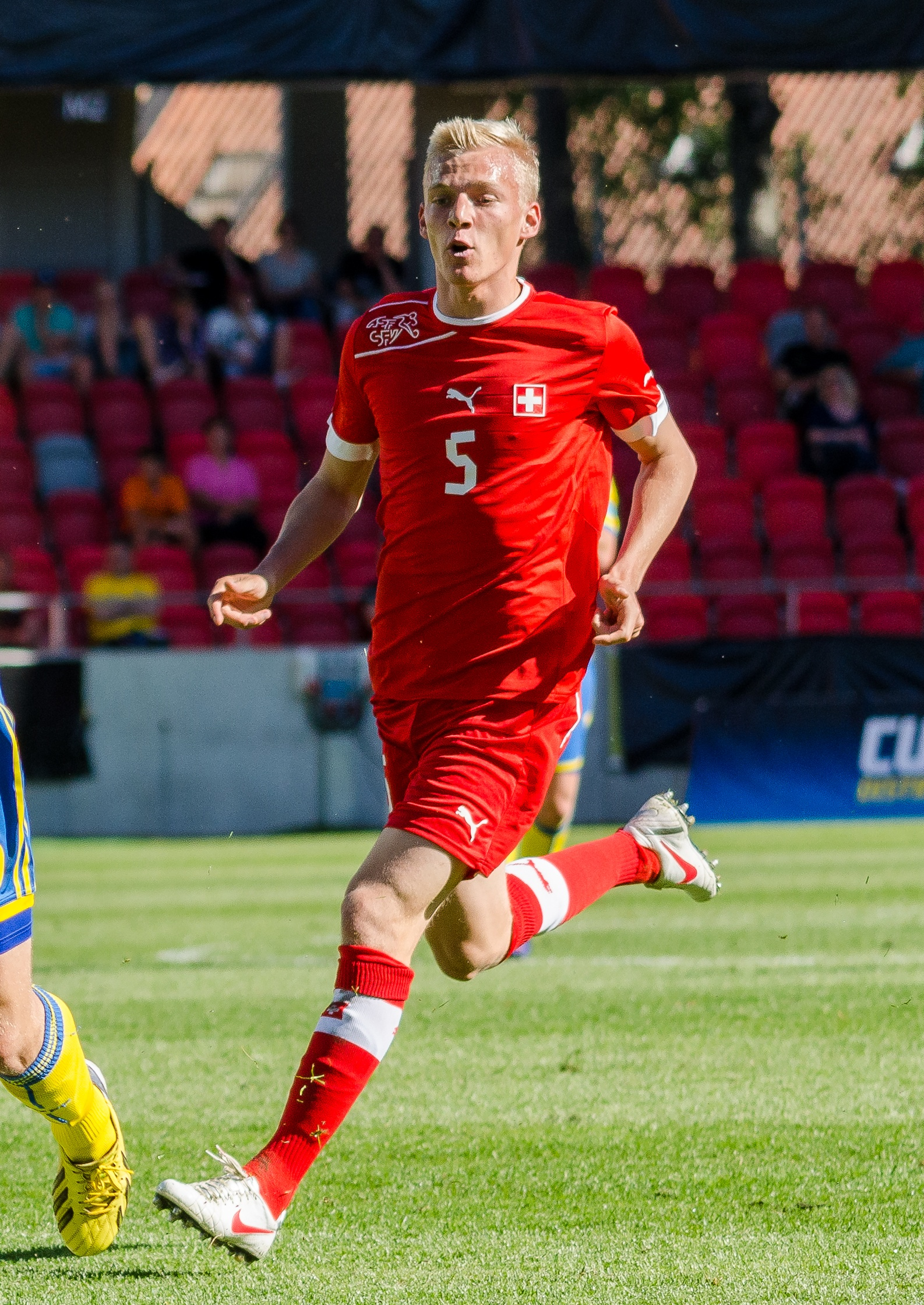 Swiss footballer Saulo Decarli in the Swiss Under-21 national team's 3-2 defeat to Sweden at Myresjöhus Arena in Växjö, June 6 2013.